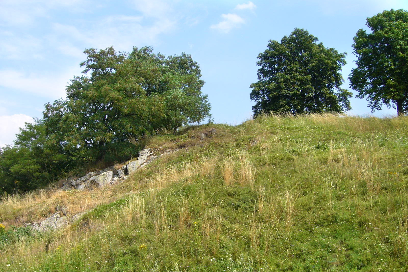 Tvrziště Hrádek, Slepičí hora, celkový pohled od jihu